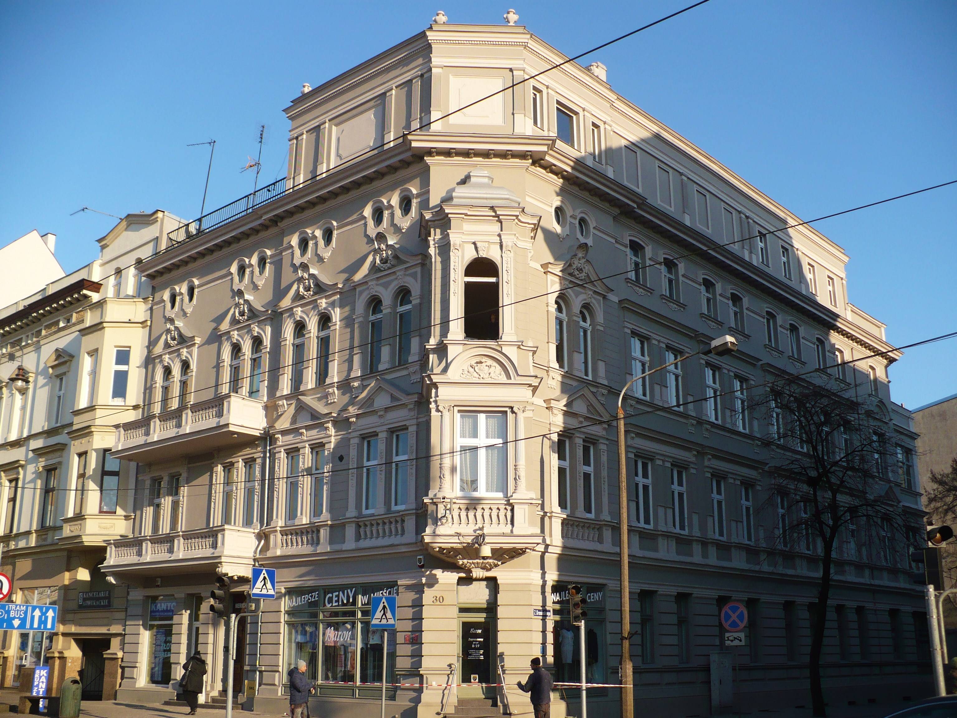 Kamienica na ul.Gdańskiej 30,róg Zygmunta Krasińskiego